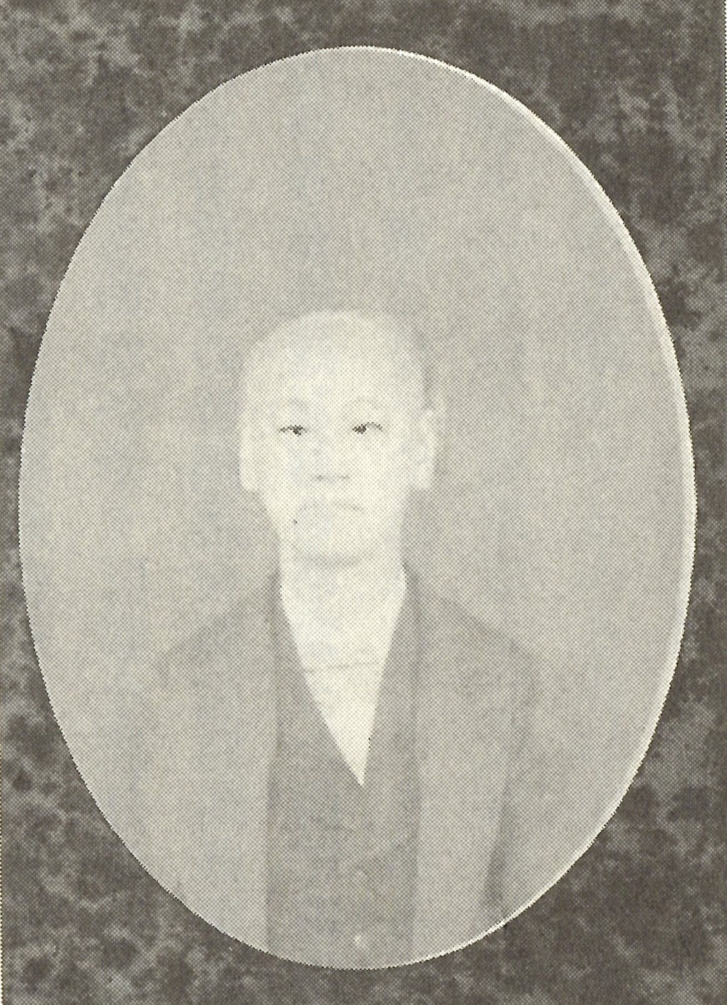 中院通富の肖像写真。